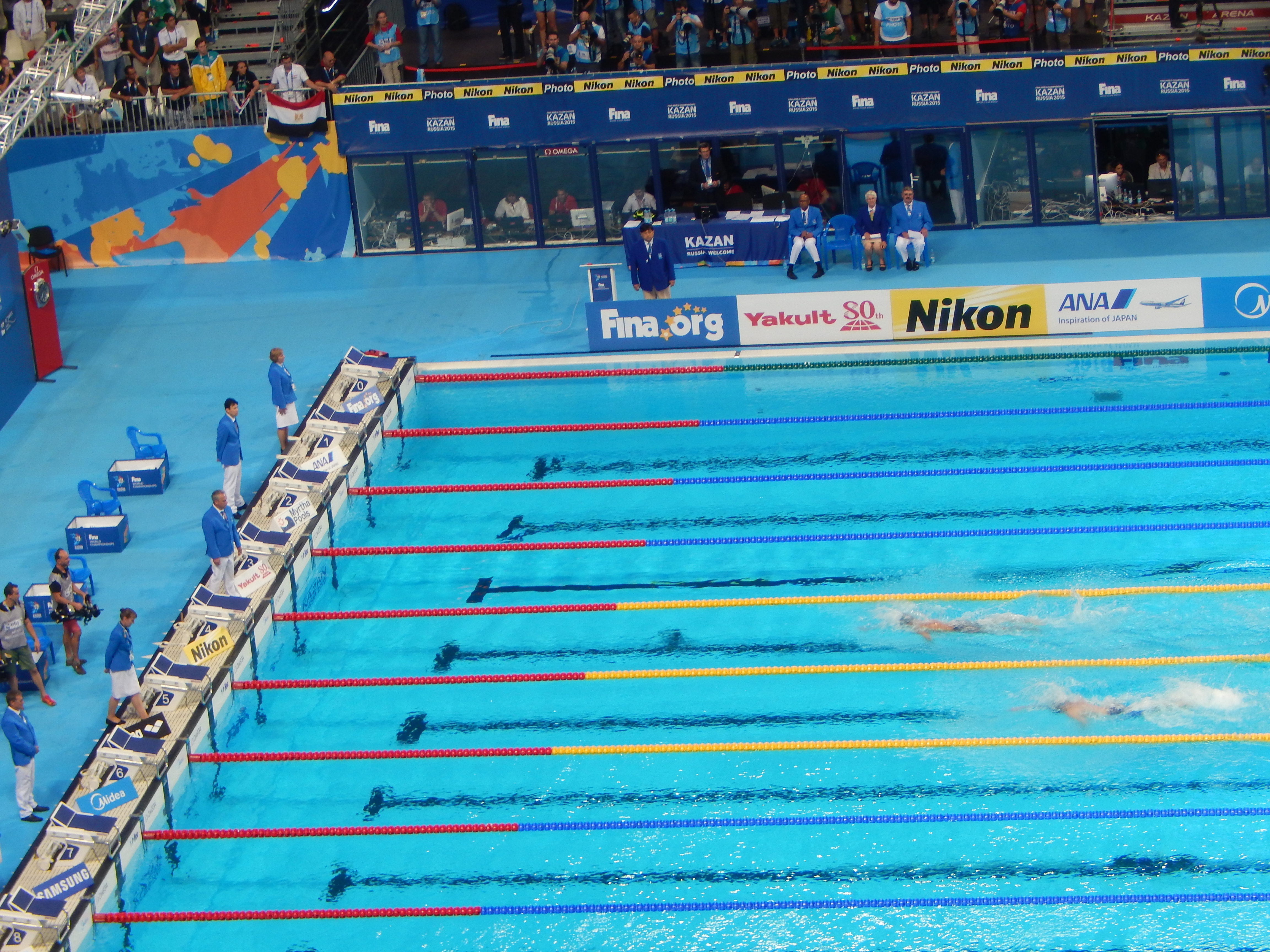 Грегорио Палтриньери и Коннор Йегер на финише дистанции 1500 метров вольным стилем